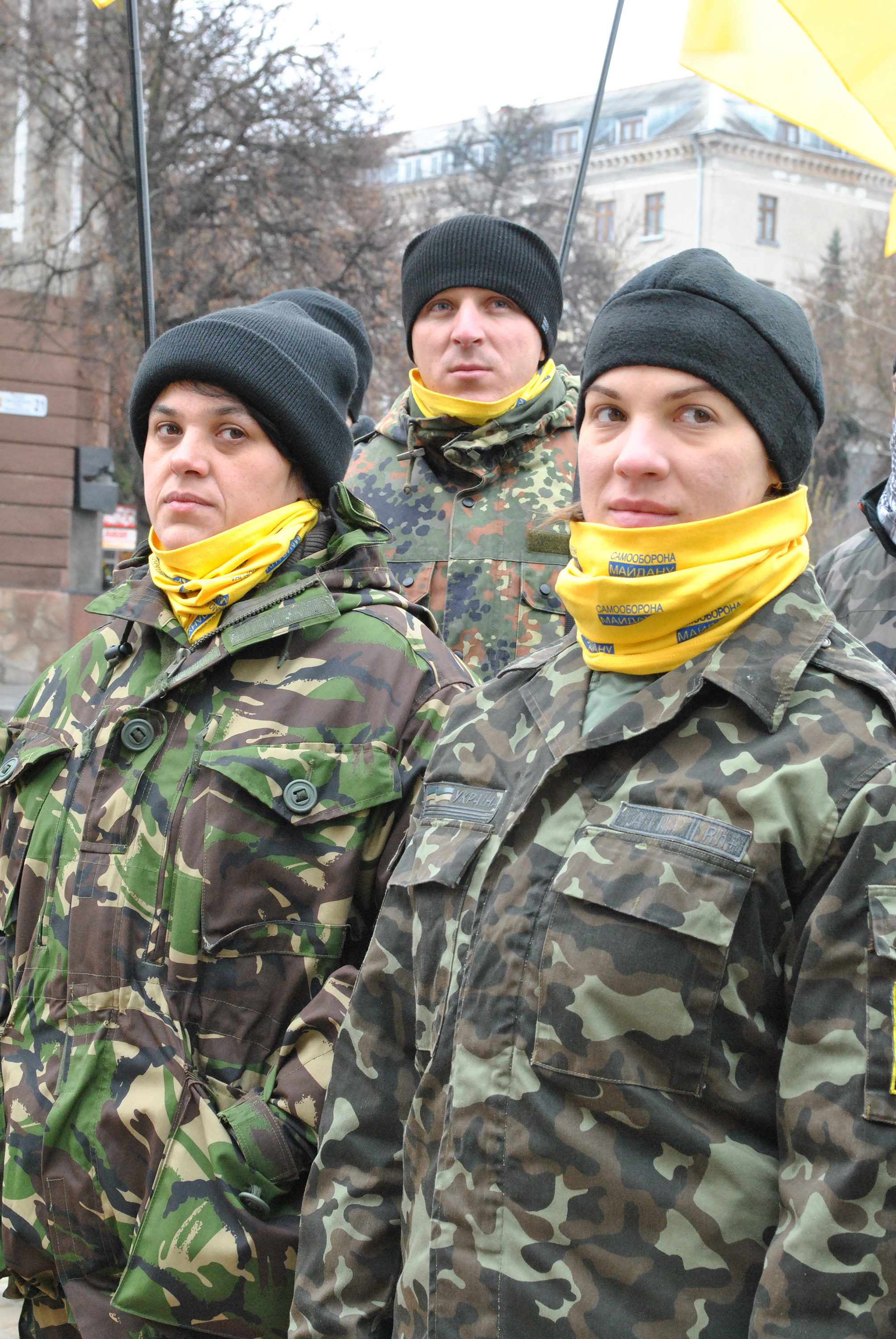 Самооборонівці Тернополя, волонтери АТО під час Маршу гідності в річницю побиття студентів у Києві. Зліва: активістка Майдану, волонтерського руху Тернопільської області, письменниця, етнолог та фольклорист Лілія Мусіхіна.